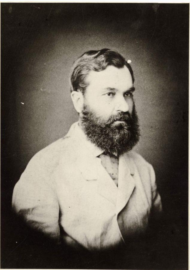 Петр Алексеевич Щепочкин (1832 - 1886) - отец Н.А. Морозова